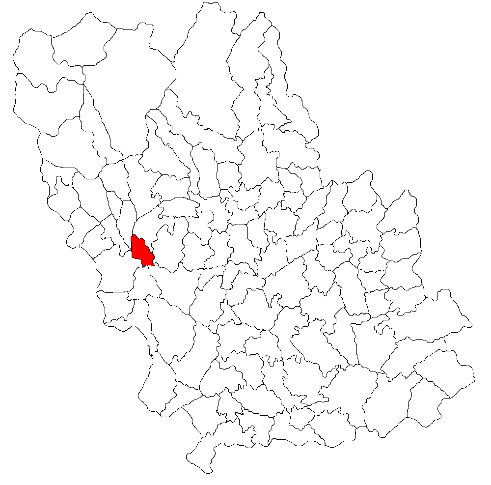 Categorie:Hărţi ale judeţului Prahova